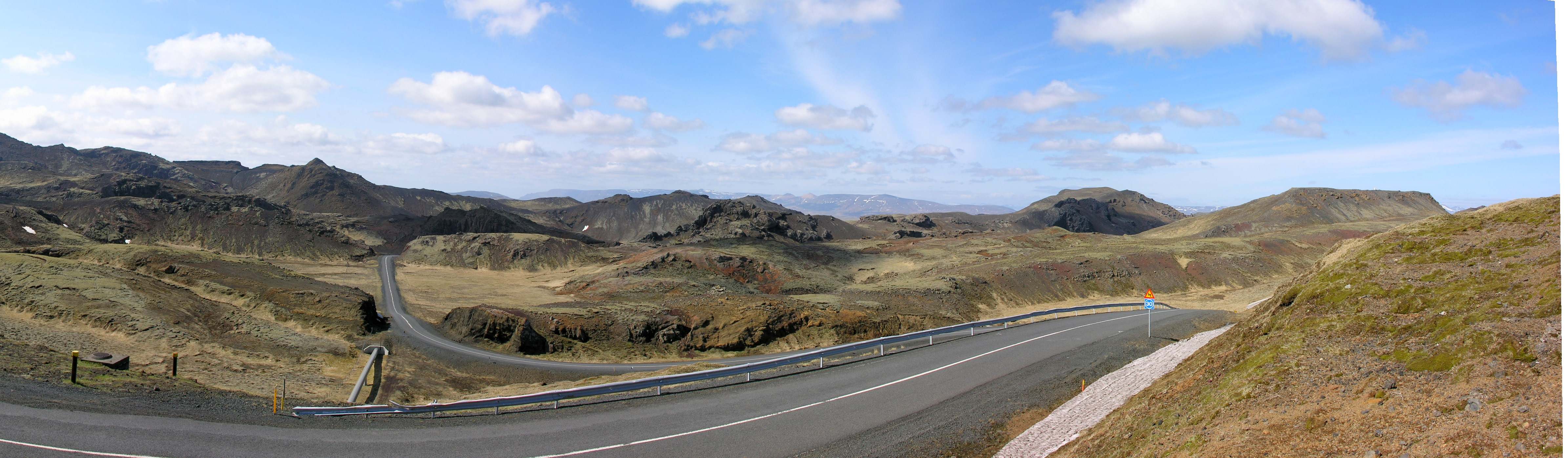 Road 435 at Nesjavellir